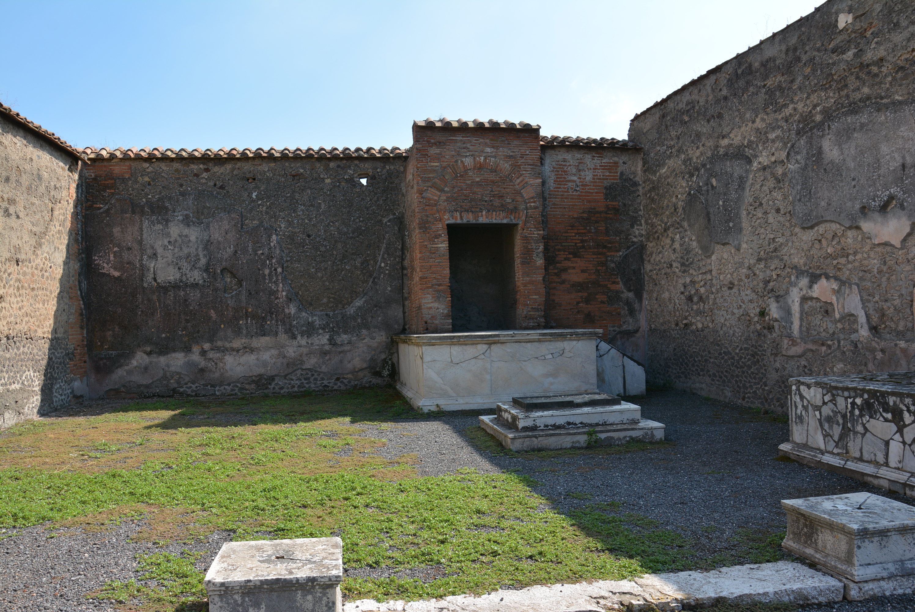 Ingresso secondario - MIBACT This is a photo of a monument which is part of cultural heritage of Italy.